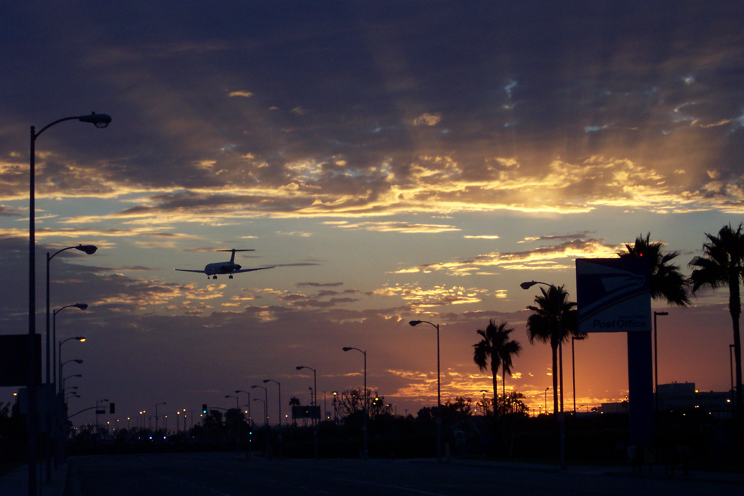 Flugzeug beim Anflug auf den Flughafen Los Angeles (LAX)